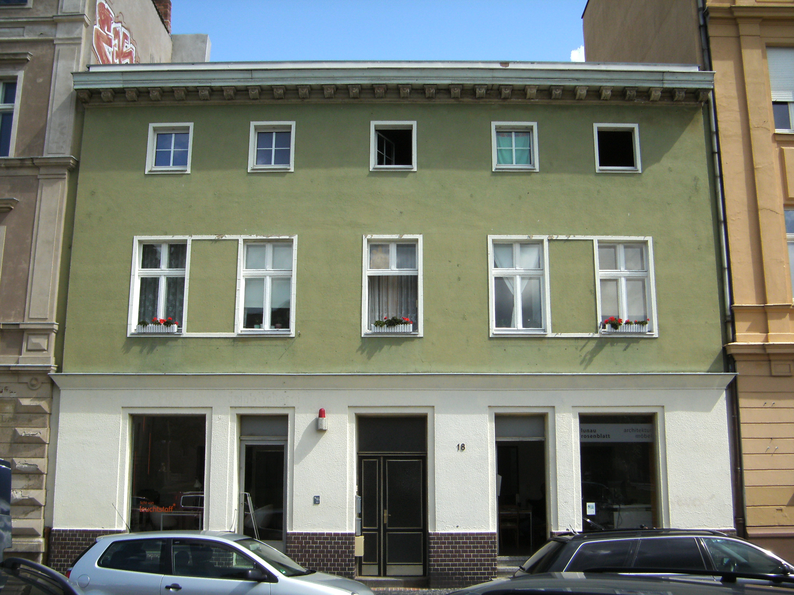 Wernerstr. 18